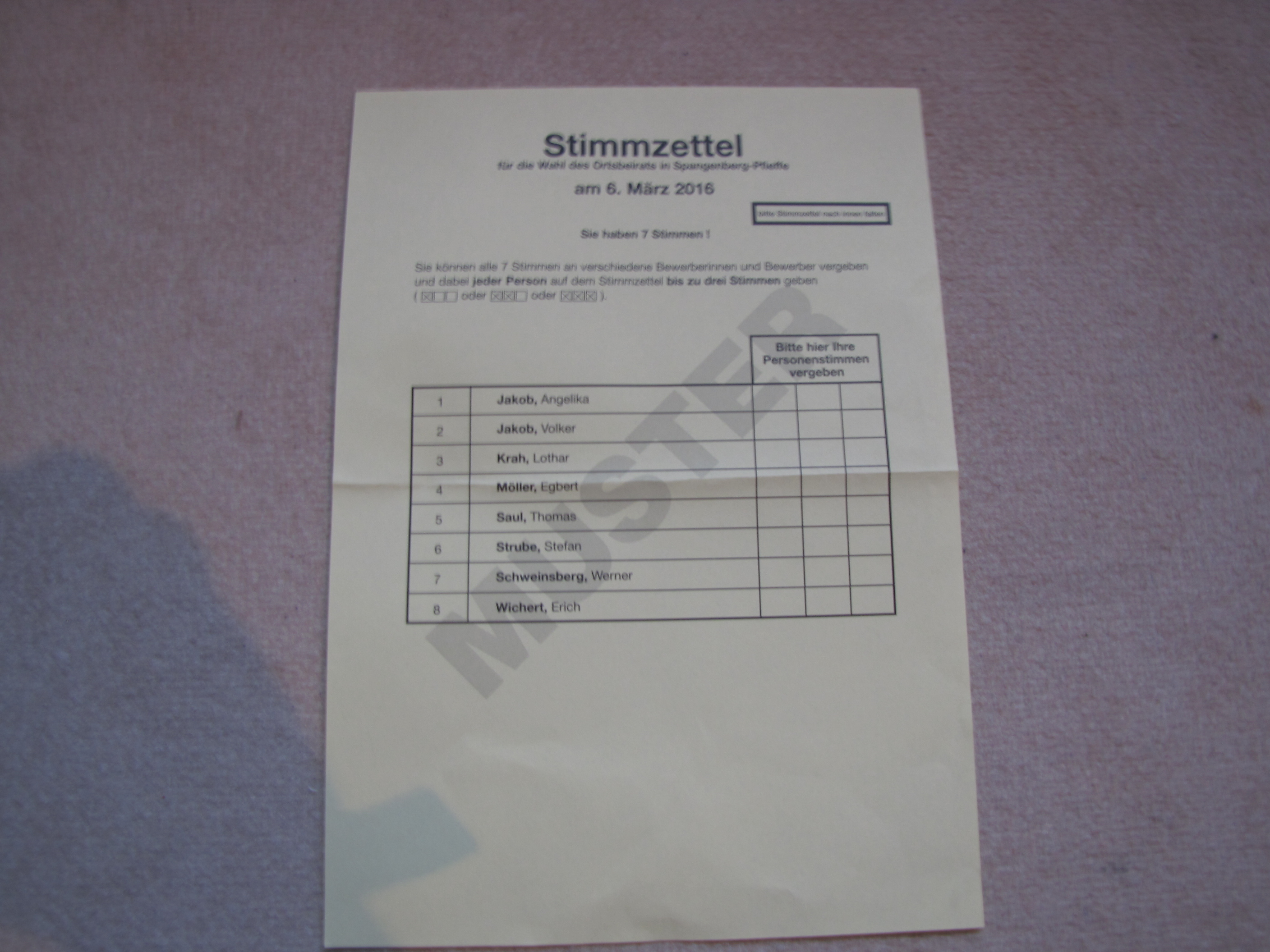 Musterstimmzettel zur Kommunalwahl 2016 in Hessen, hier: Ortsbeirat